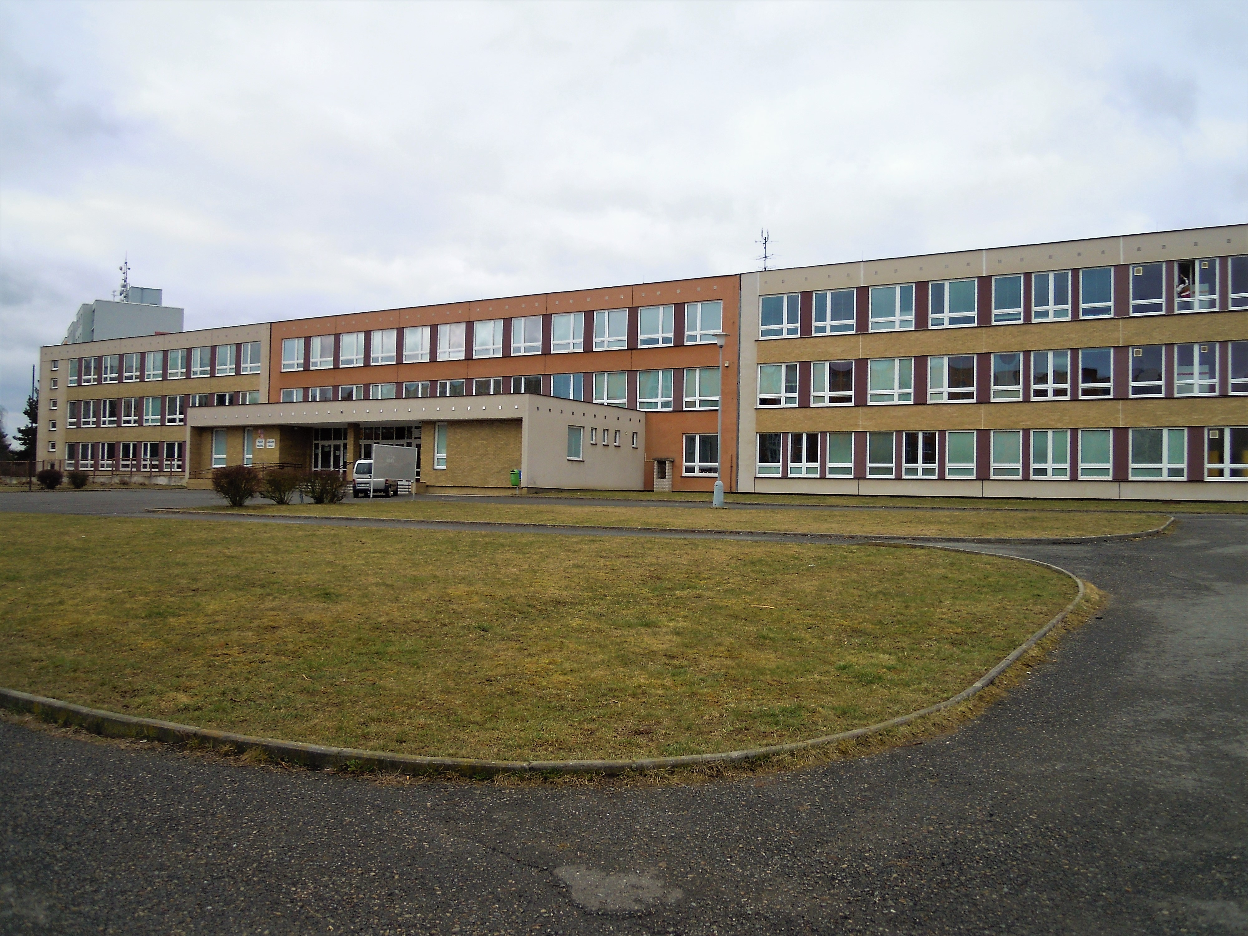 Sídliště Košutka, 4. ZŠ - Kralovická ulice